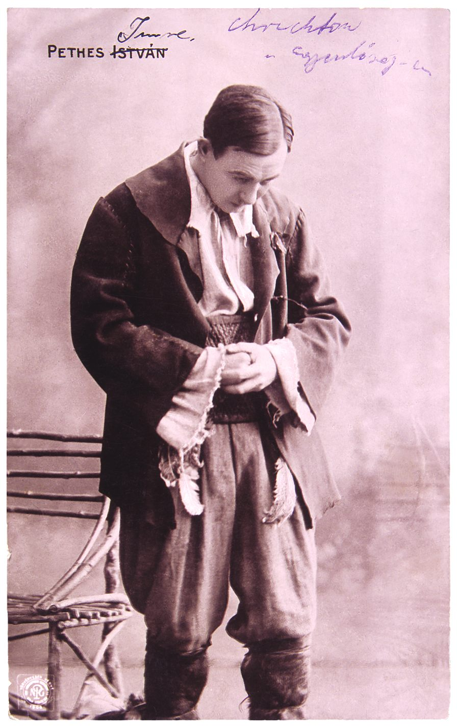 Pethes Imre (1864–1924) drámai színész J. M. Barrie Egyenlőség című színdarabjában Chricton szerepében a Nemzeti Színházban 1904. január 15-én.